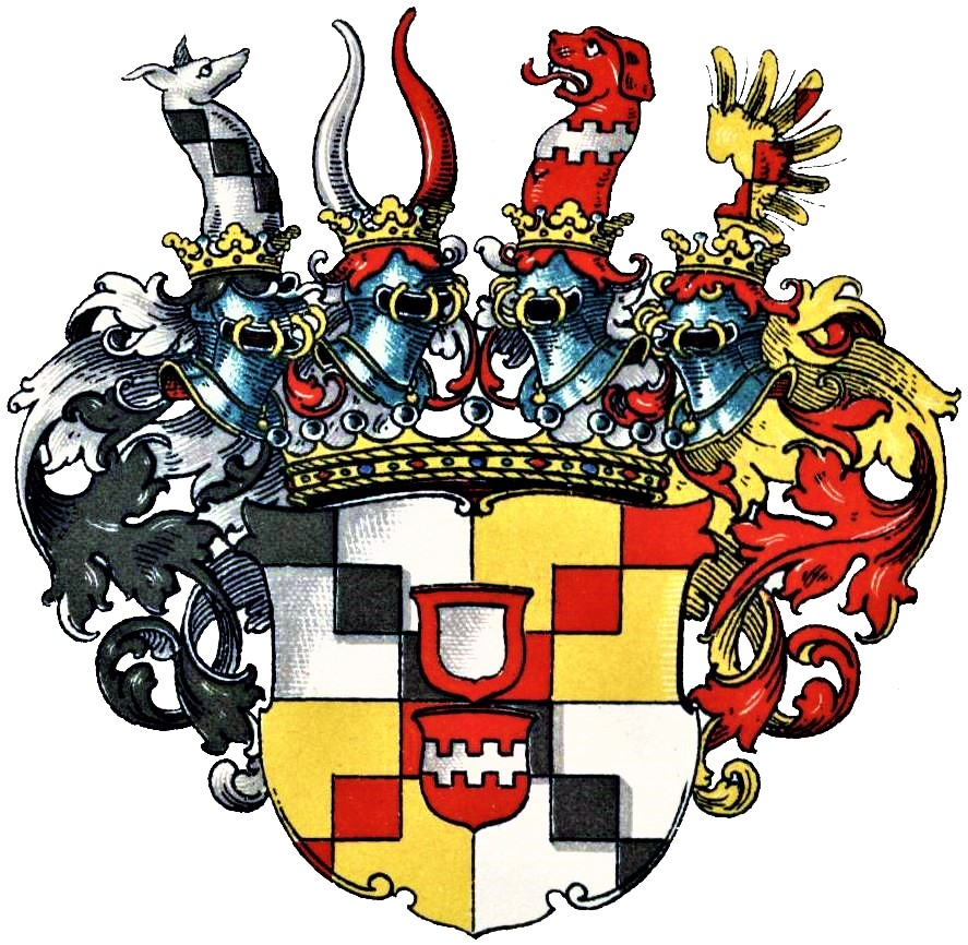 Wappen Grafen Droste zu Vischering von Nesselrode-Reichenstein seit 1824 (Testament des letzten Gf. v. Nesselrode-Reichenstein) bzw. 1826 (kgl. preuß. Bestätigung)